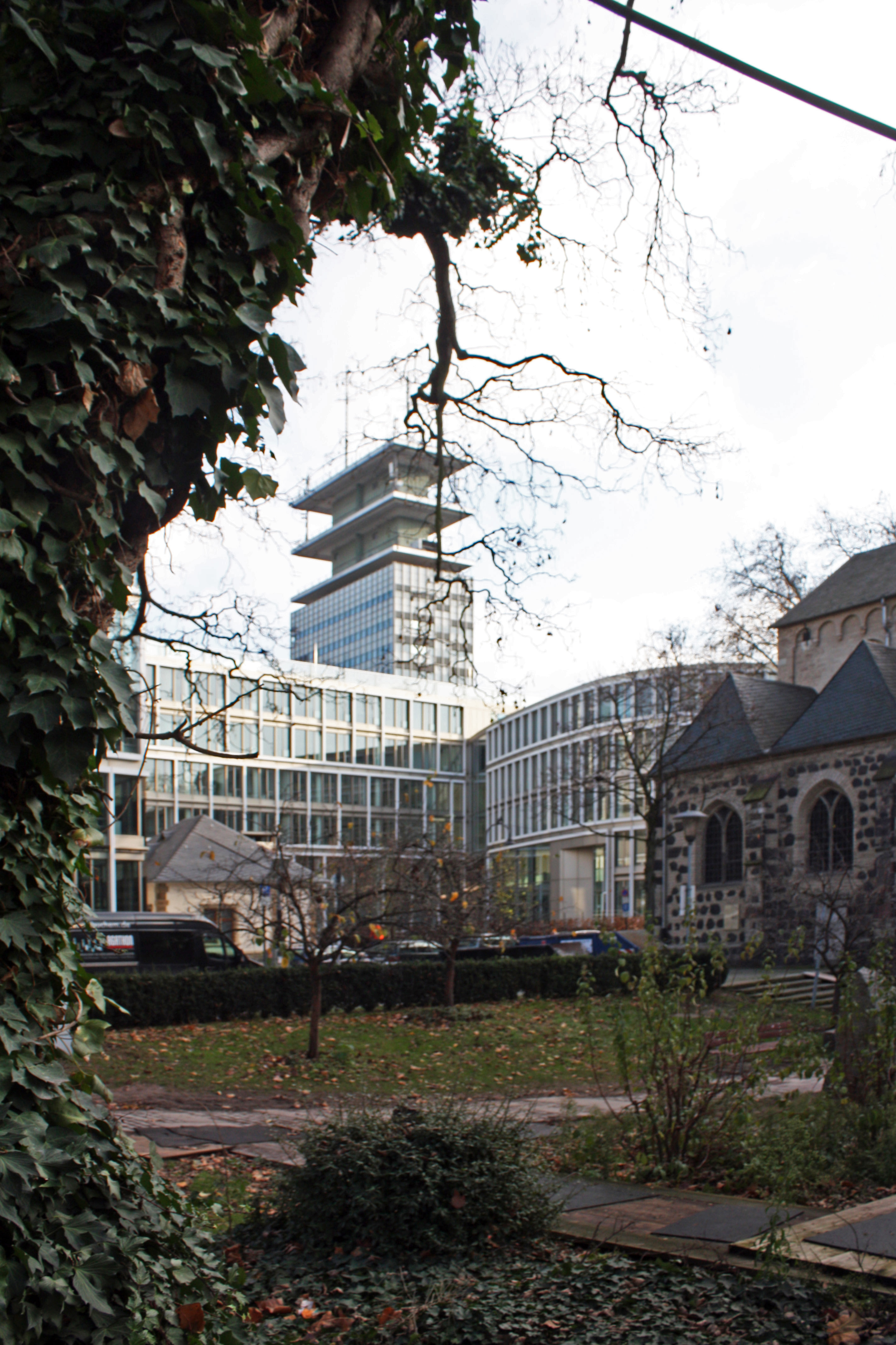 „Cäcilium“ Köln, Cäcilienkloster. Areal der ehemaligen römischen Therme der CCAA